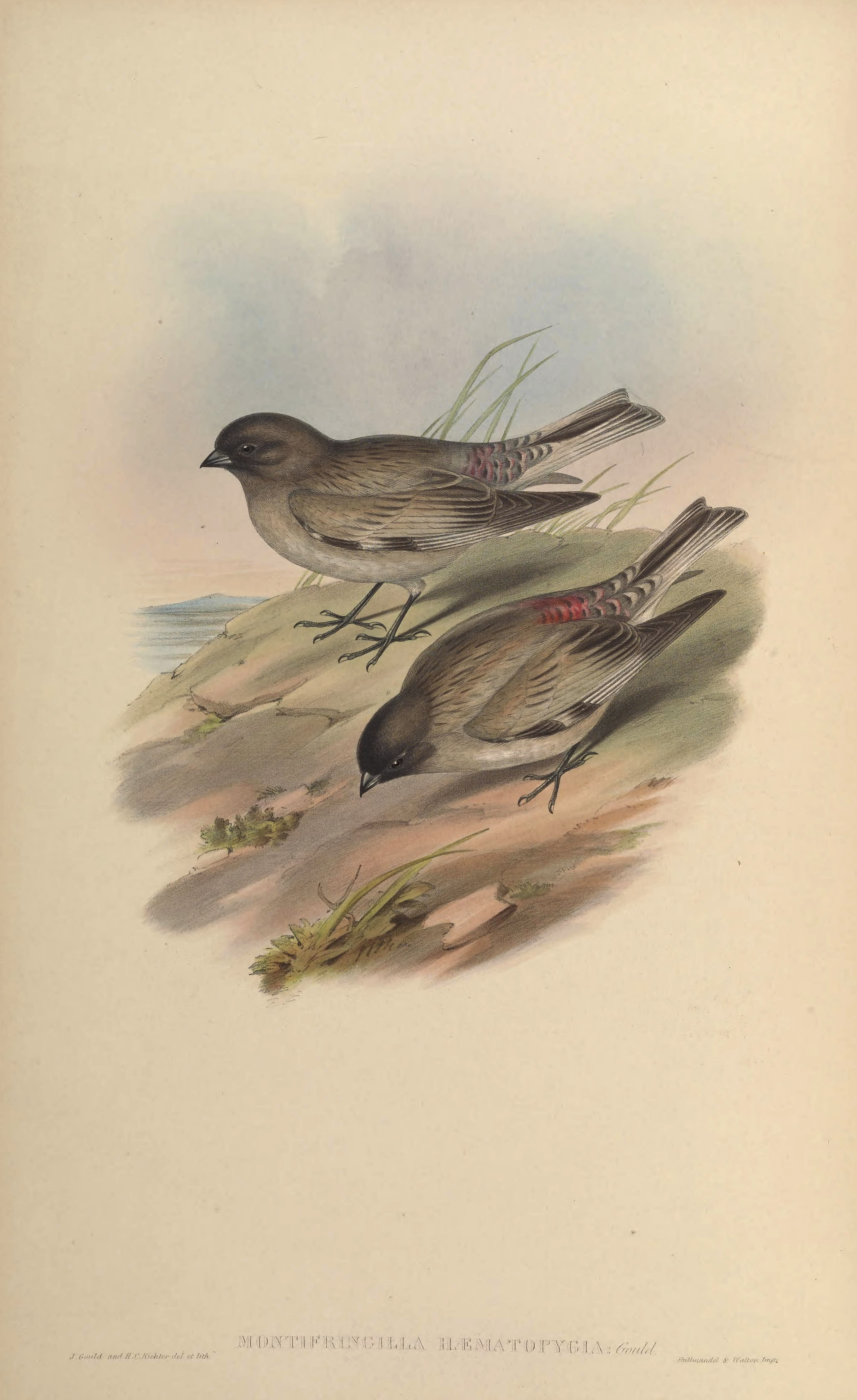 Montifringilla haematopygia = Leucosticte brandti haematopygia[1]